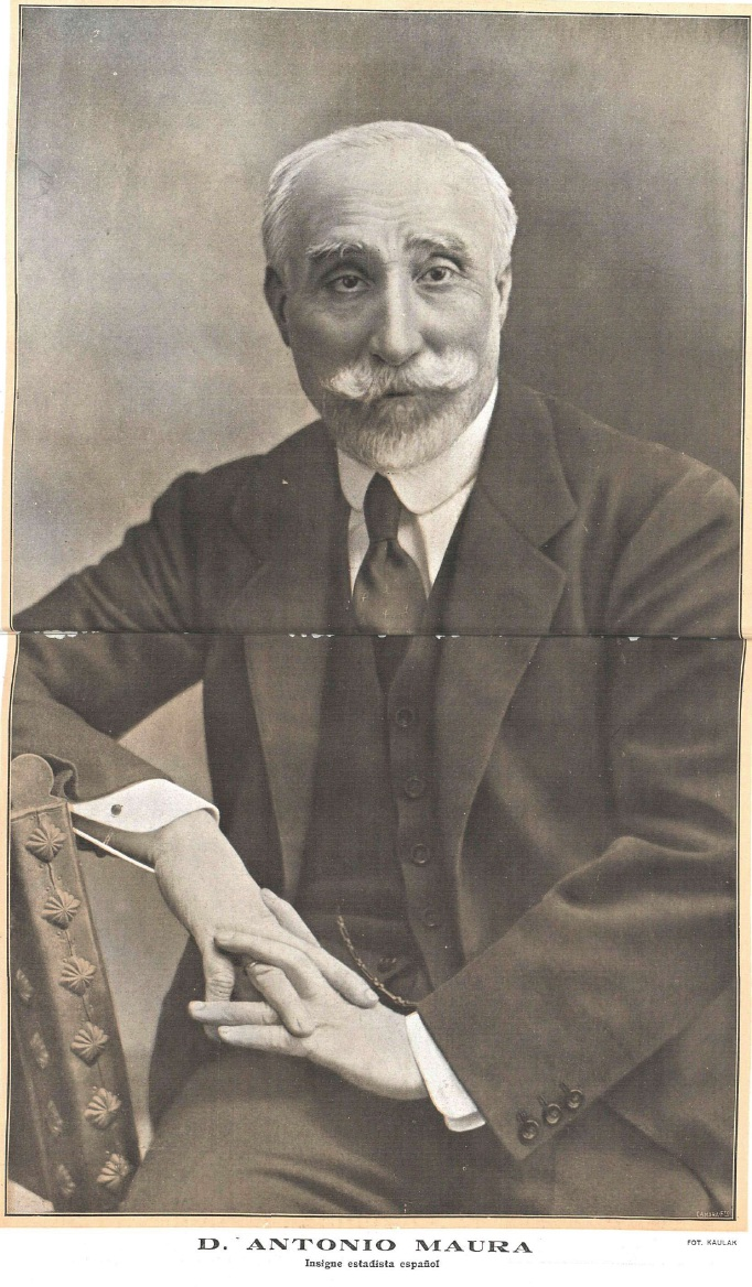 D. Antonio Maura, insigne estadista español, obra del fotógrafo Kaulak, recogido en la revista española La Esfera.